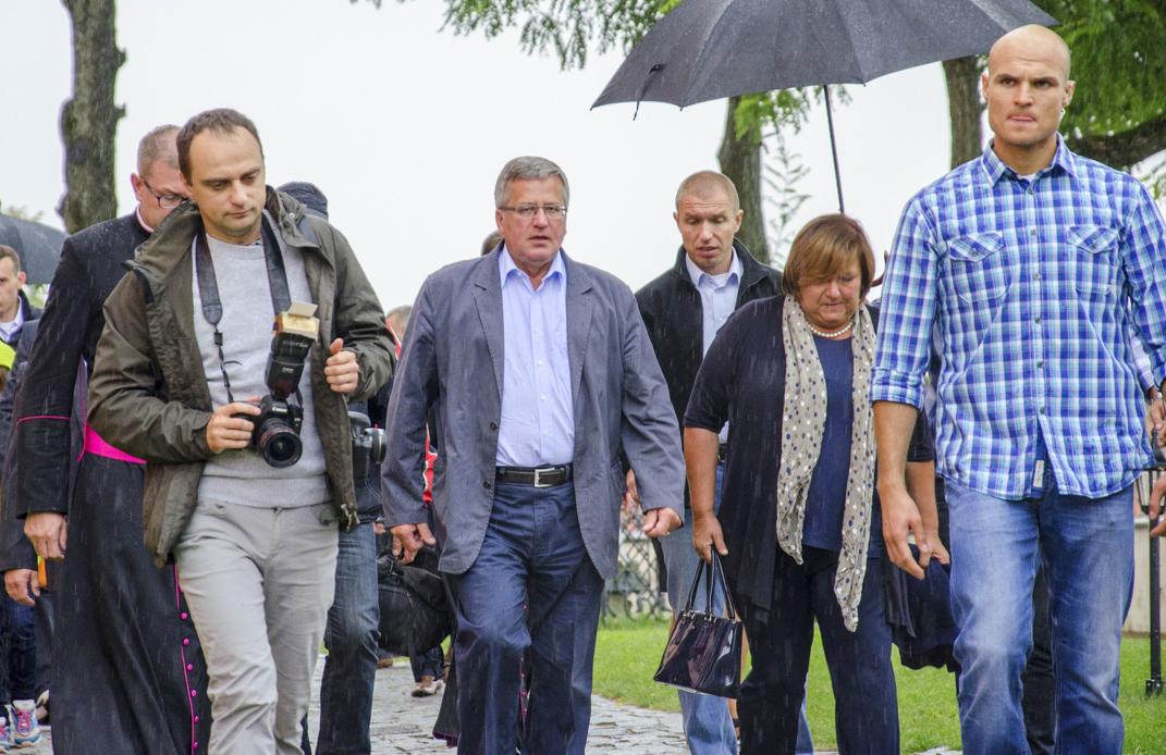 Bronisław Komorowski i Anna Komorowska